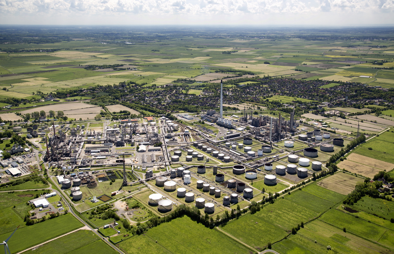 Deitsch: Luftbild der Raffinerie Heide GmbH, Standort Hemmingstedt